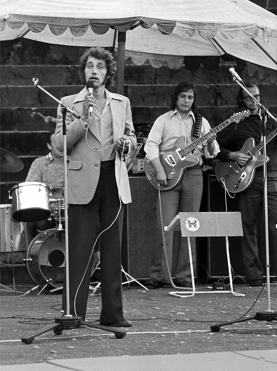 Ardo Juhkov, eesti laulja 1974